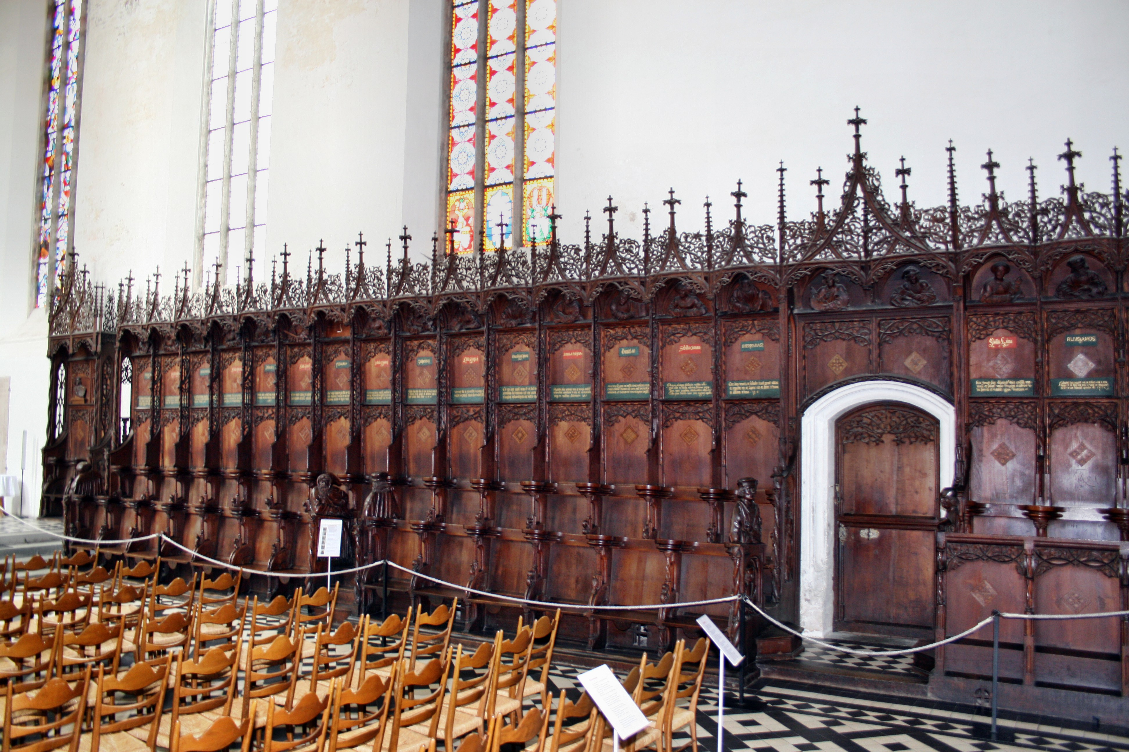 Der südliche Teil des 1507 fertiggestellten Chorgestühls.